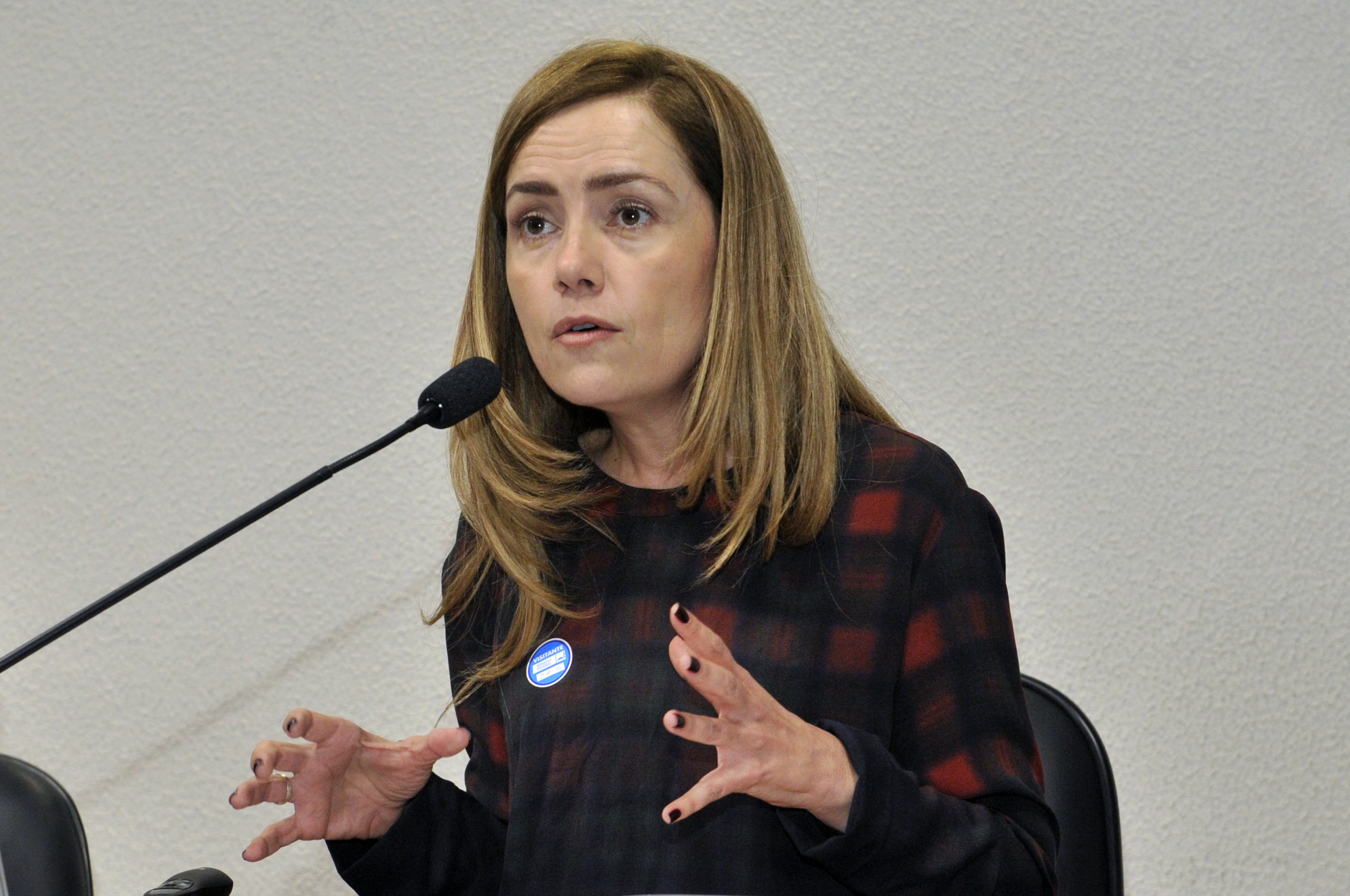 Comissão de Direitos Humanos e Legislação Participativa (CDH) realiza audiência pública interativa sobre violências motivadas por orientação sexual e identidade de gênero. Entre os convidados estão representantes da Associação Brasileira de Gays, Lésbicas, Bissexuais, Travestis e Transexuais, da Universidade de Brasília e da Procuradoria Geral da República. Debater o tema: "Violências Motivadas por Orientação Sexual e Identidade de Gênero: análise de situação e respostas". Em pronunciamento, a professora da Universidade de Brasília (UnB) e pesquisadora do Instituto de Bioética, Direitos Humanos e Gênero (Anis), Débora Diniz. Foto: Waldemir Barreto/Agência Senado